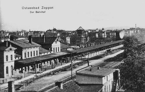 Nieistniejący dworzec kolejowy w Sopocie, widok w kierunku Gdańska.